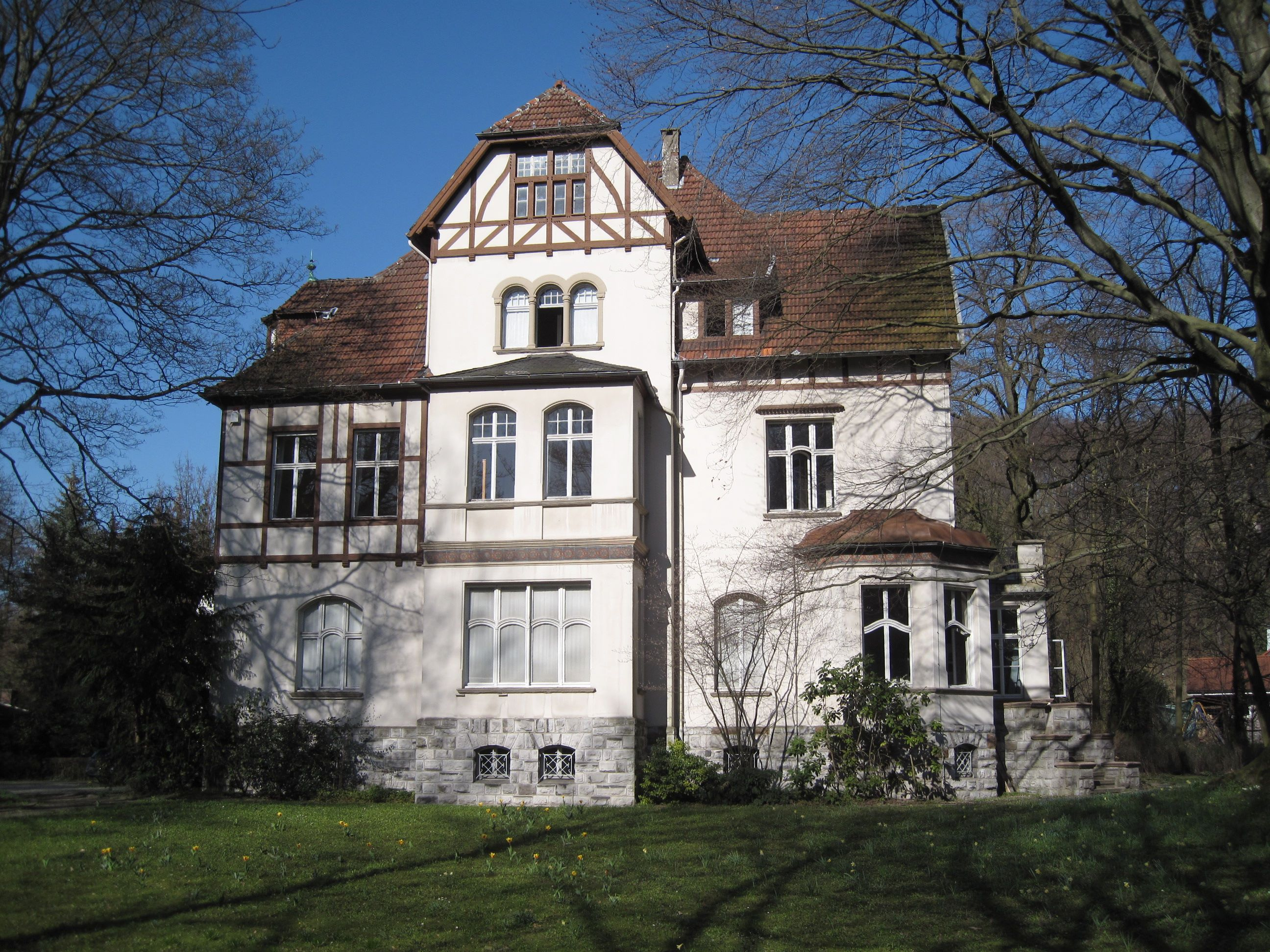 Felsenmeer-Museum, denkmalgeschützte Jugendstil-Villa „Grah“ in Hemer, Hönnetalstraße 21.